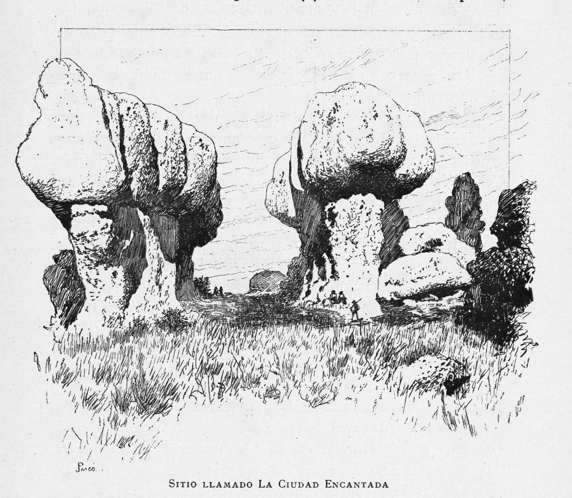 Sitio llamado La Ciudad Encantada.